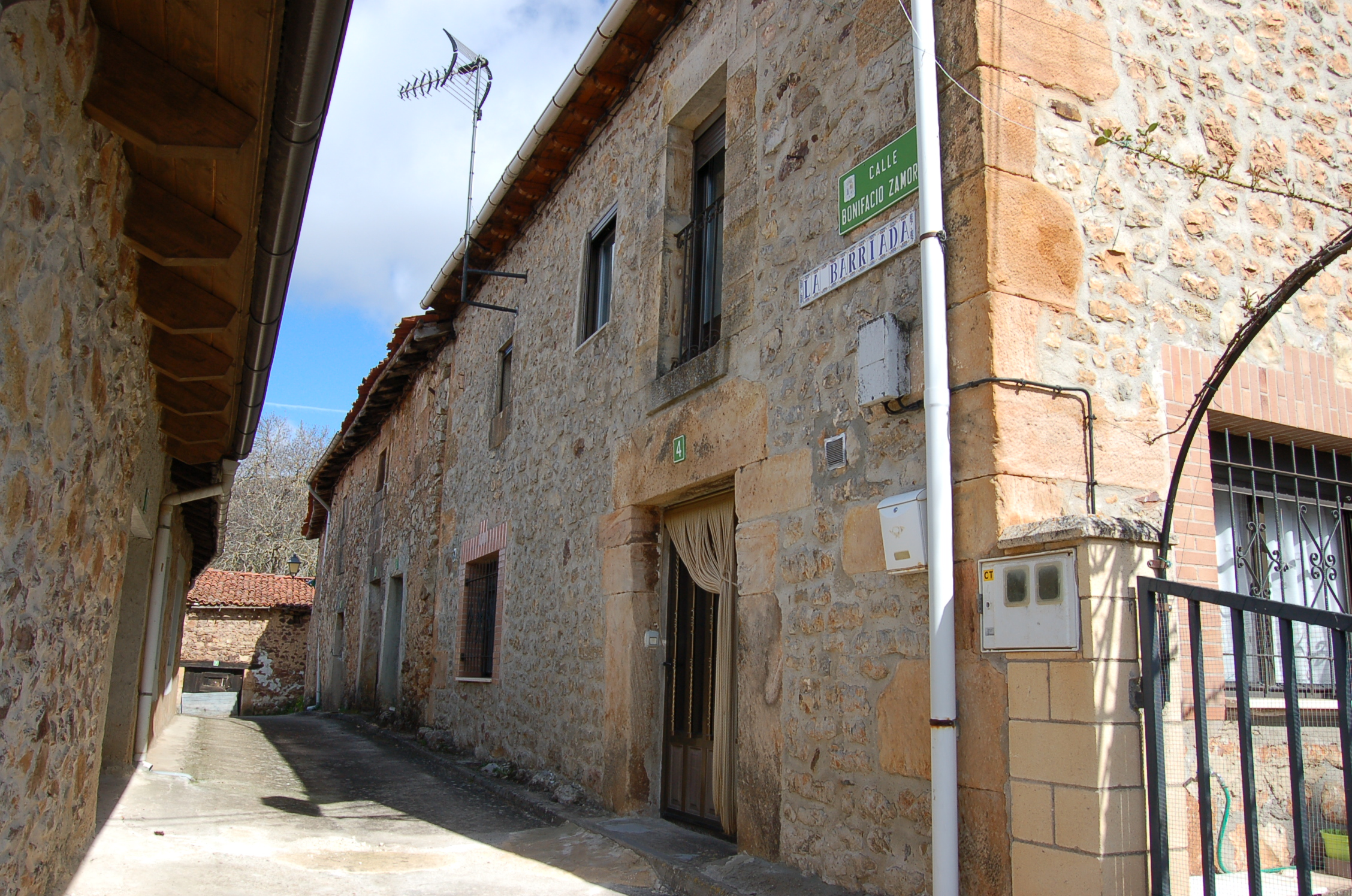 Calle de Bonifacio Zamora en Monterrubio de la Demanda